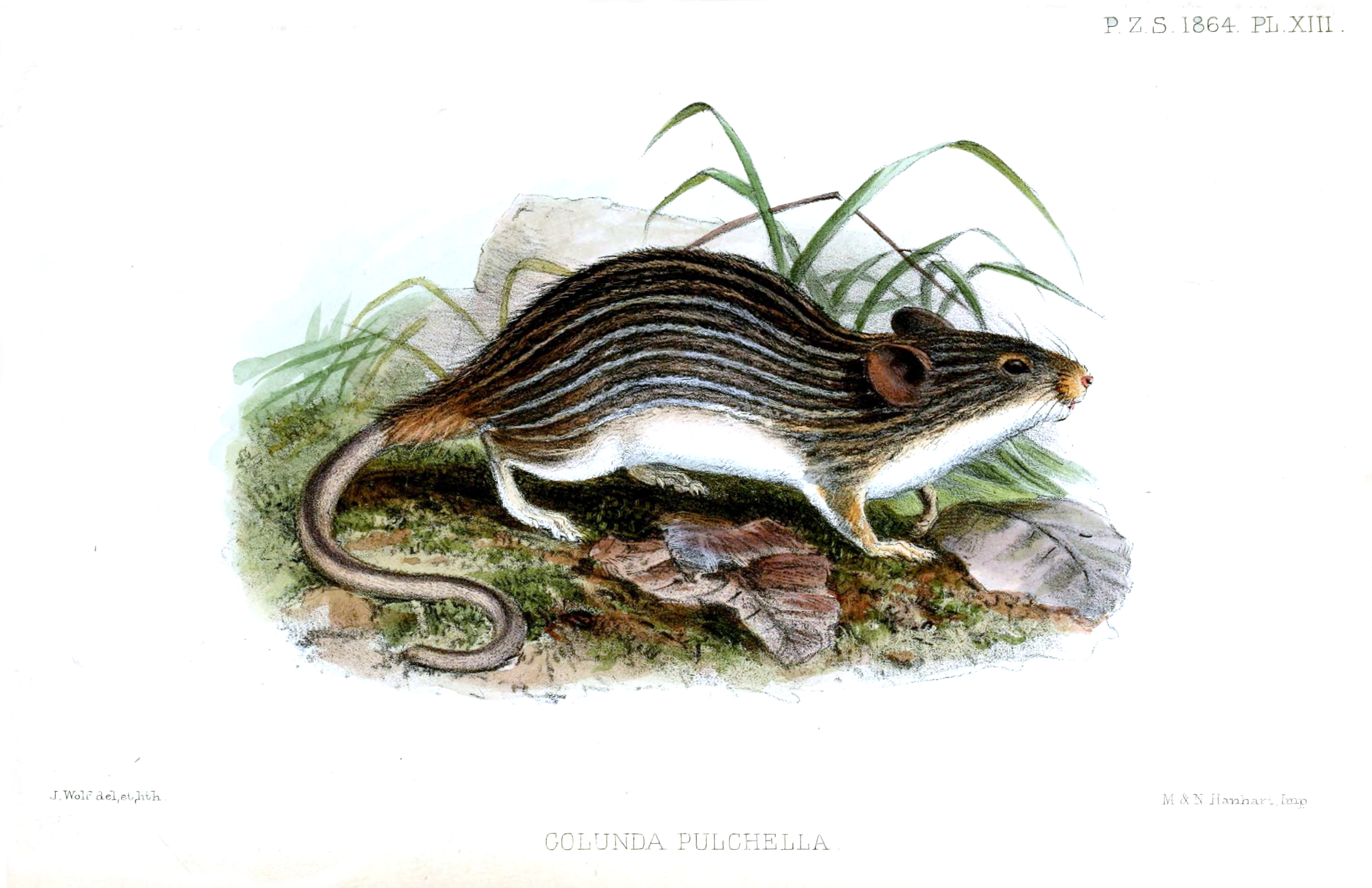 Golunda pulchella=Lemniscomys striatus pulchella